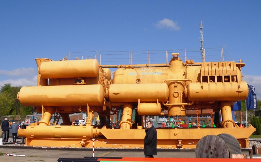 Unterwasserstation Helgoland im Nautineum Stralsund